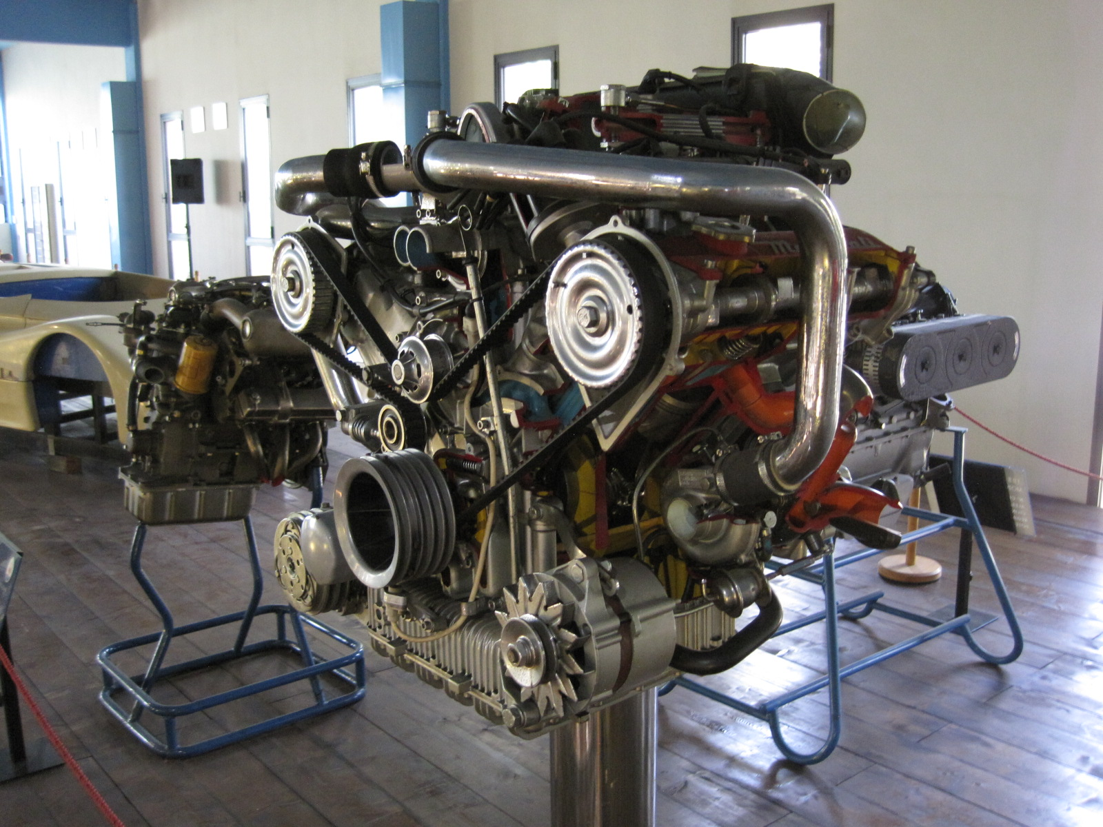 Automobiles in Panini Maserati Museum in Modène - Moteur Maserati